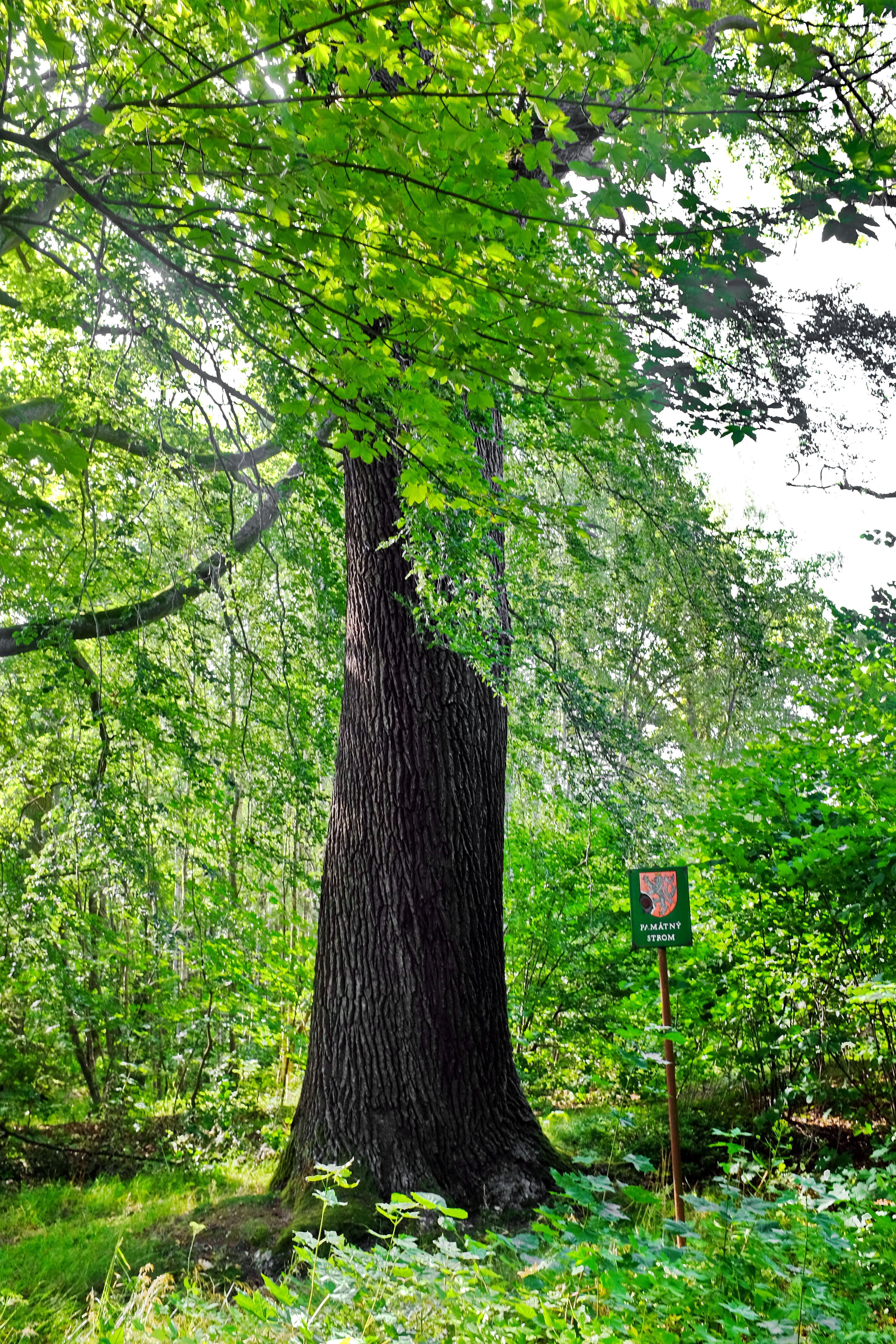 Památný strom - Dub u Dolíšky - Hranice, okres Cheb